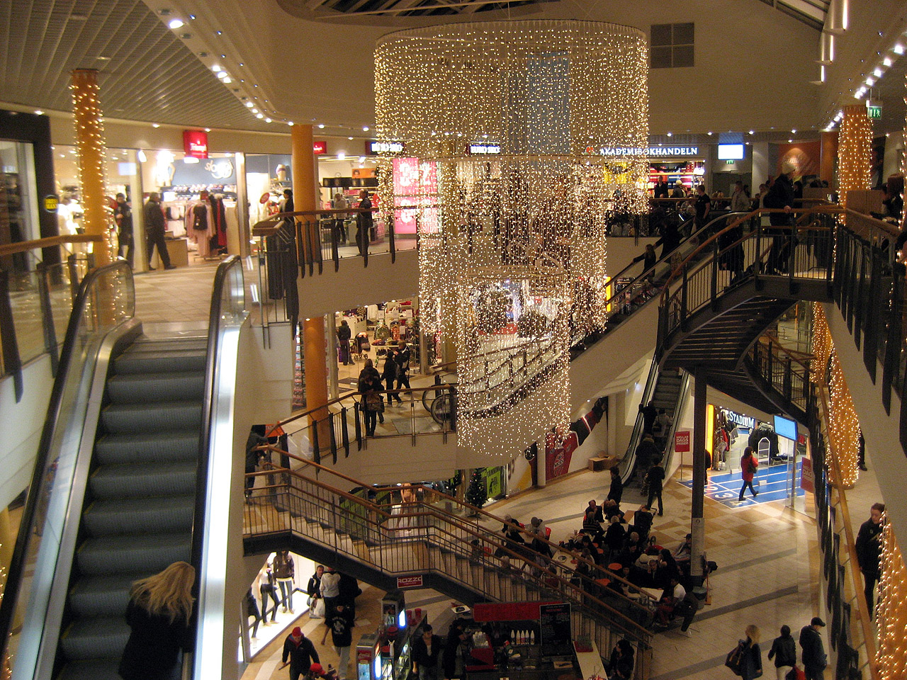 Oskargallerian, a shopping mall in Örnsköldsvik, Sweden